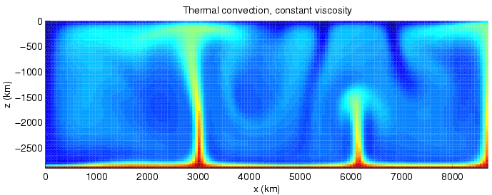 Bildbeschreibung: Numerisches Modell von Mantelkonvektion Quelle: H. Schmeling, Uni Frankfurt Fotograf/Zeichner: H. Scmeling Datum: ca 2002 andere Versionen: ...